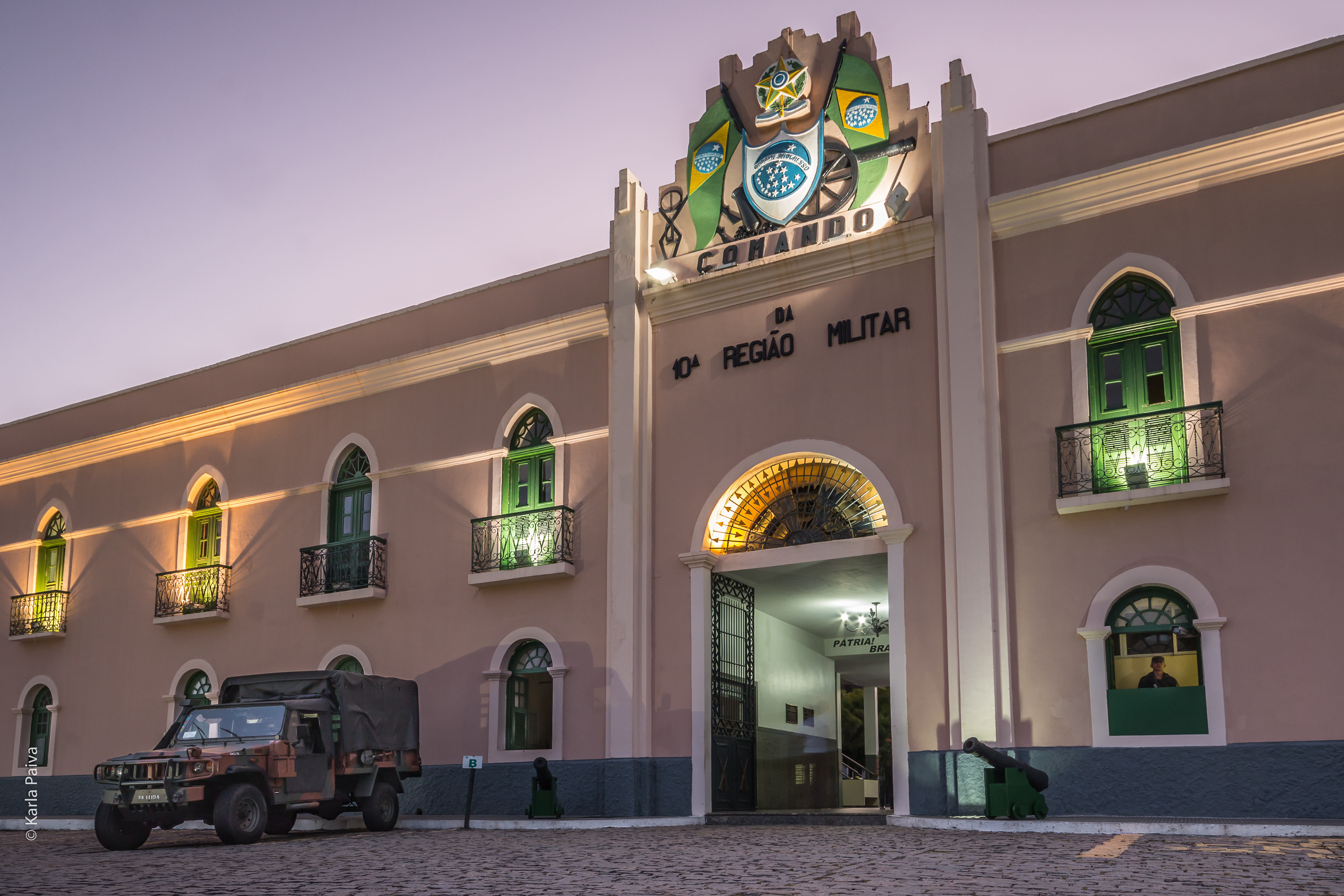 Conjunto Constituído pela Fortaleza de Nossa Senhora da Assunção, com o Material de Artilharia Composto pelos Canhões de n. 01 a 06, e pelo Antigo Quartel da Guarnição do Ceará, Atual Quartel da 10ª RM